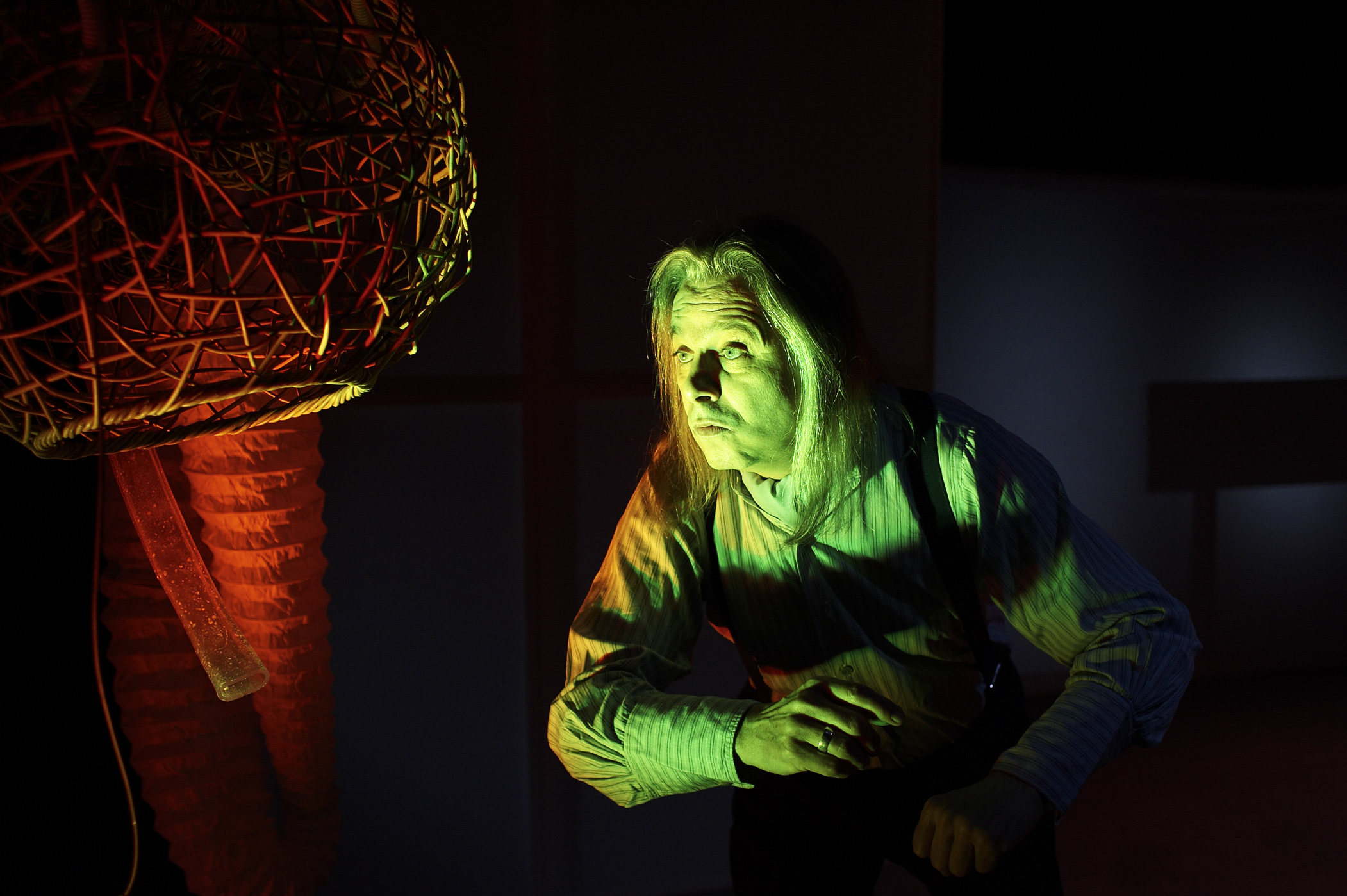 Werner Mössler in "Gentle Rage"